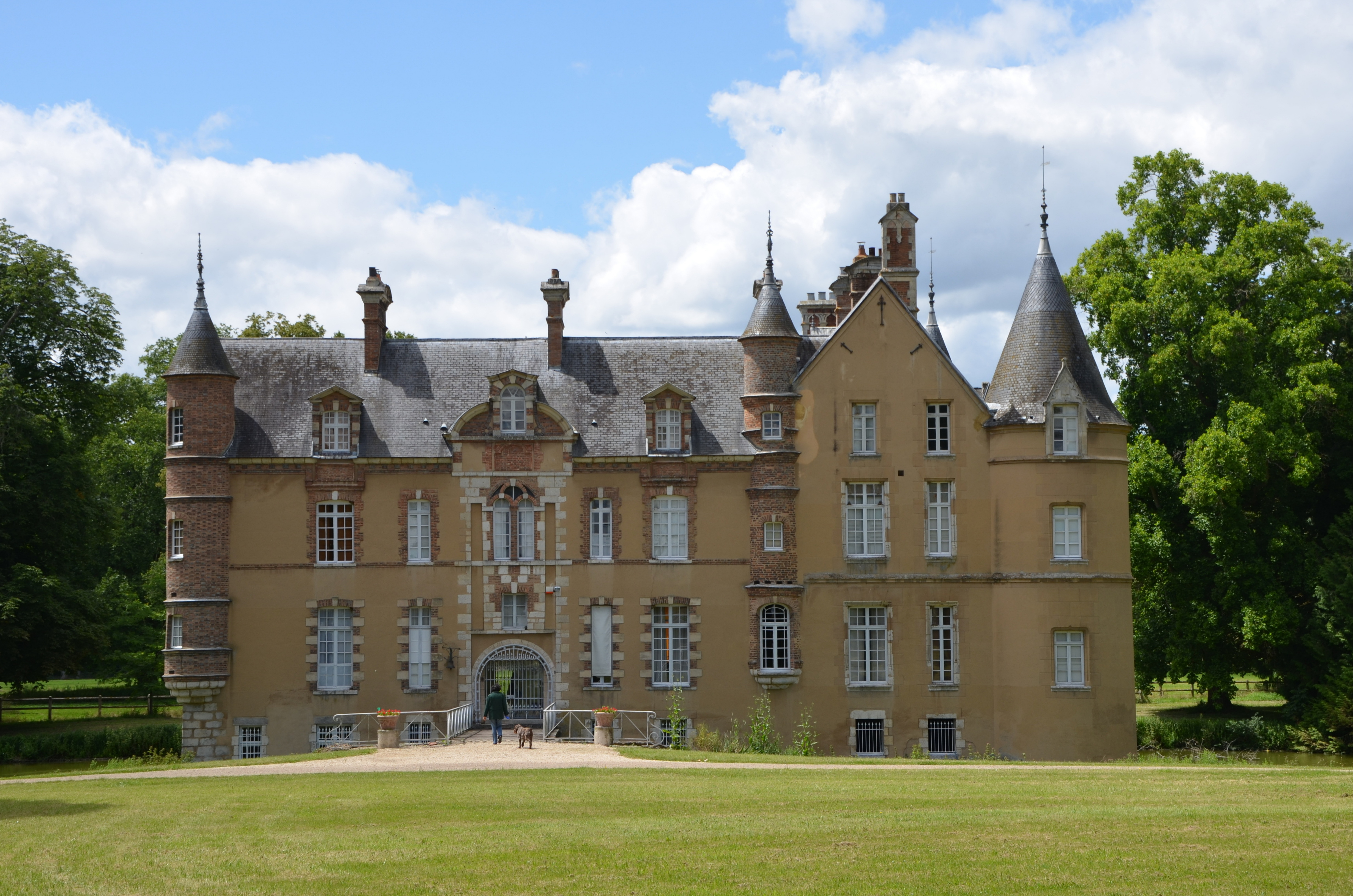 Chateau de La Motte à Lorrez le Bocage Preaux, Seine et Marne, Ile de France, France